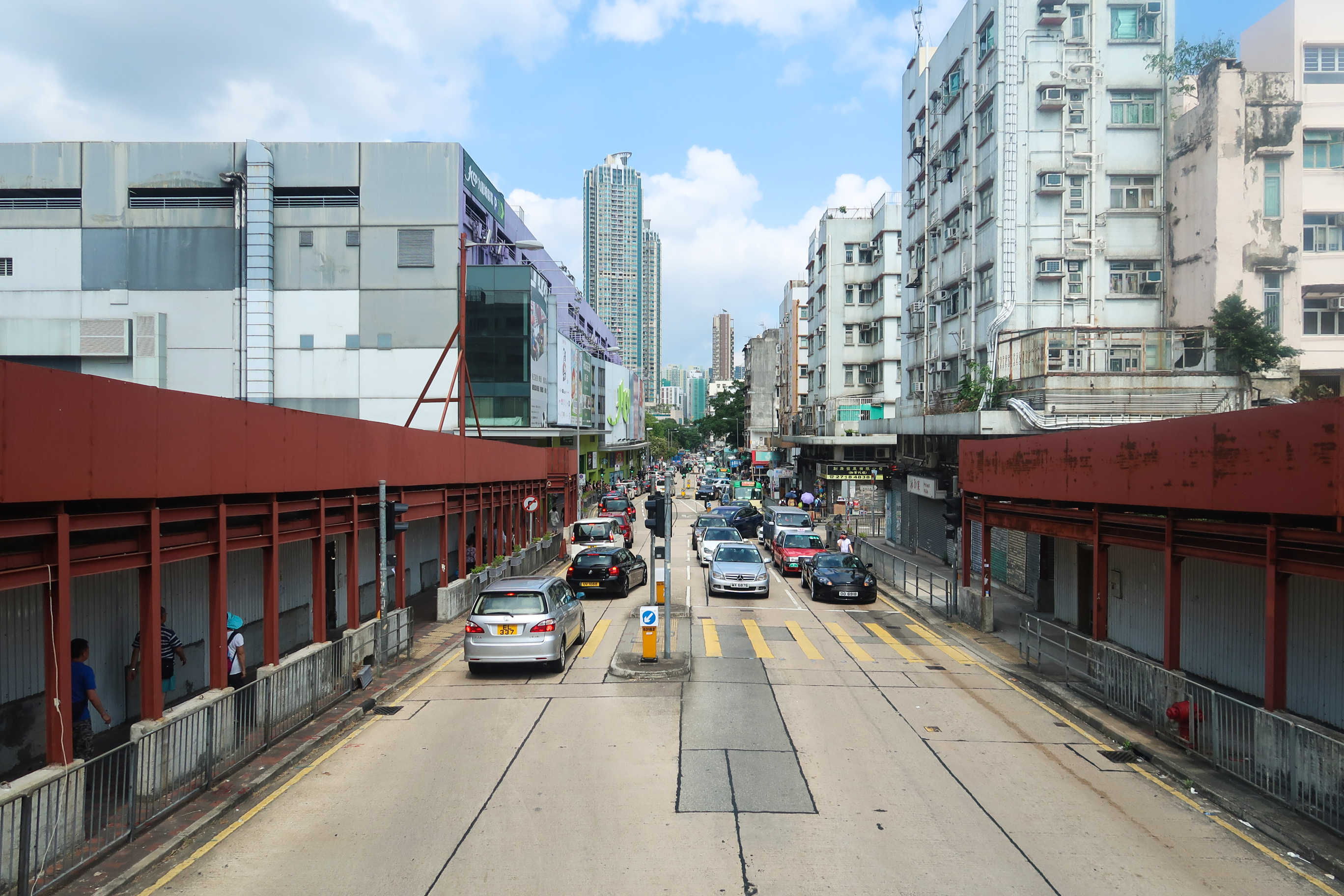 Carpenter Road